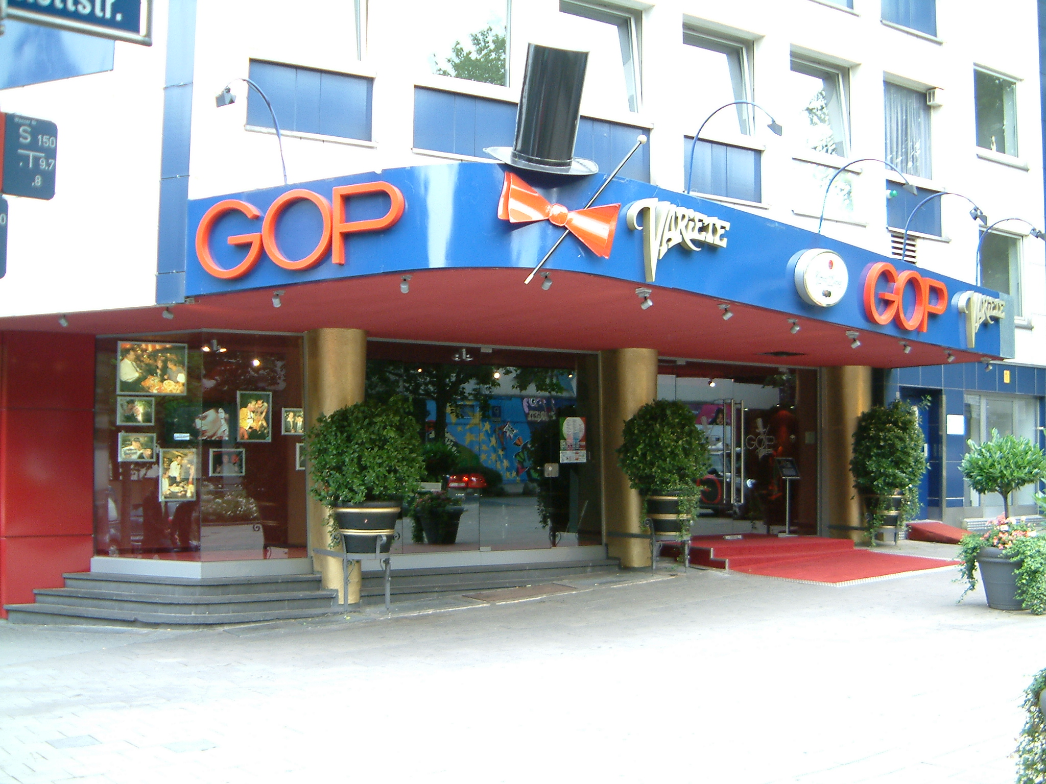 GOP Variete in Essen